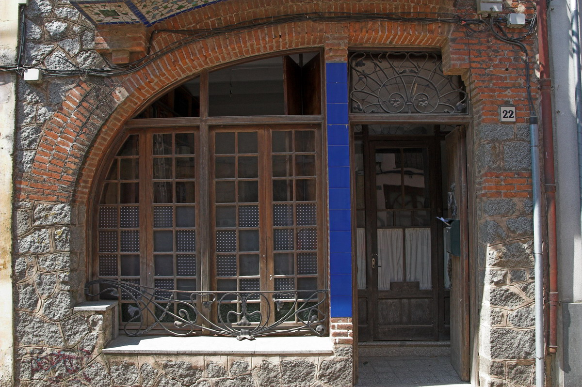 Casa Millet (Sant Antoni de Vilamajor-Vallès Oriental-Catalunya), obra de atribuida a Joaquim Raspall de 1910.